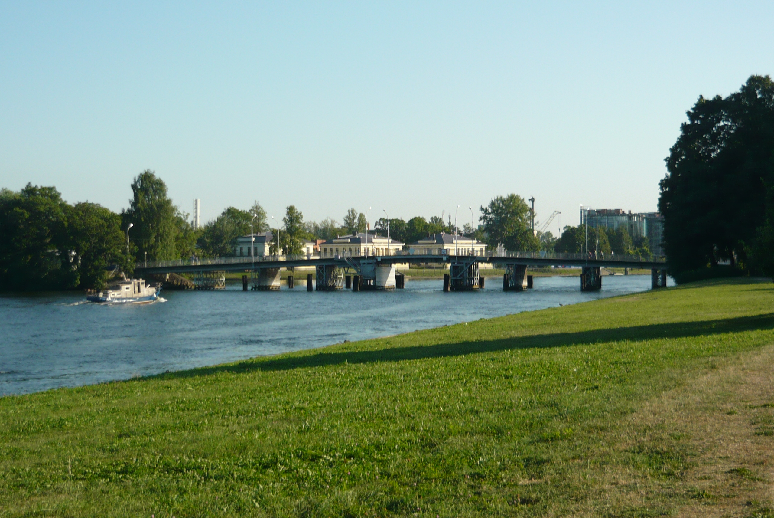 Елагин остров. 1-й Елагин мост